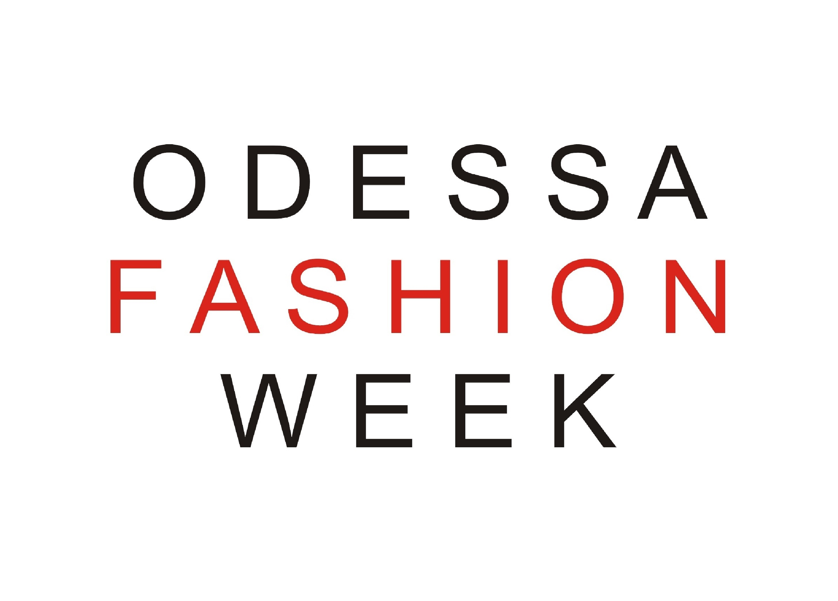 Odessa Fashion Week